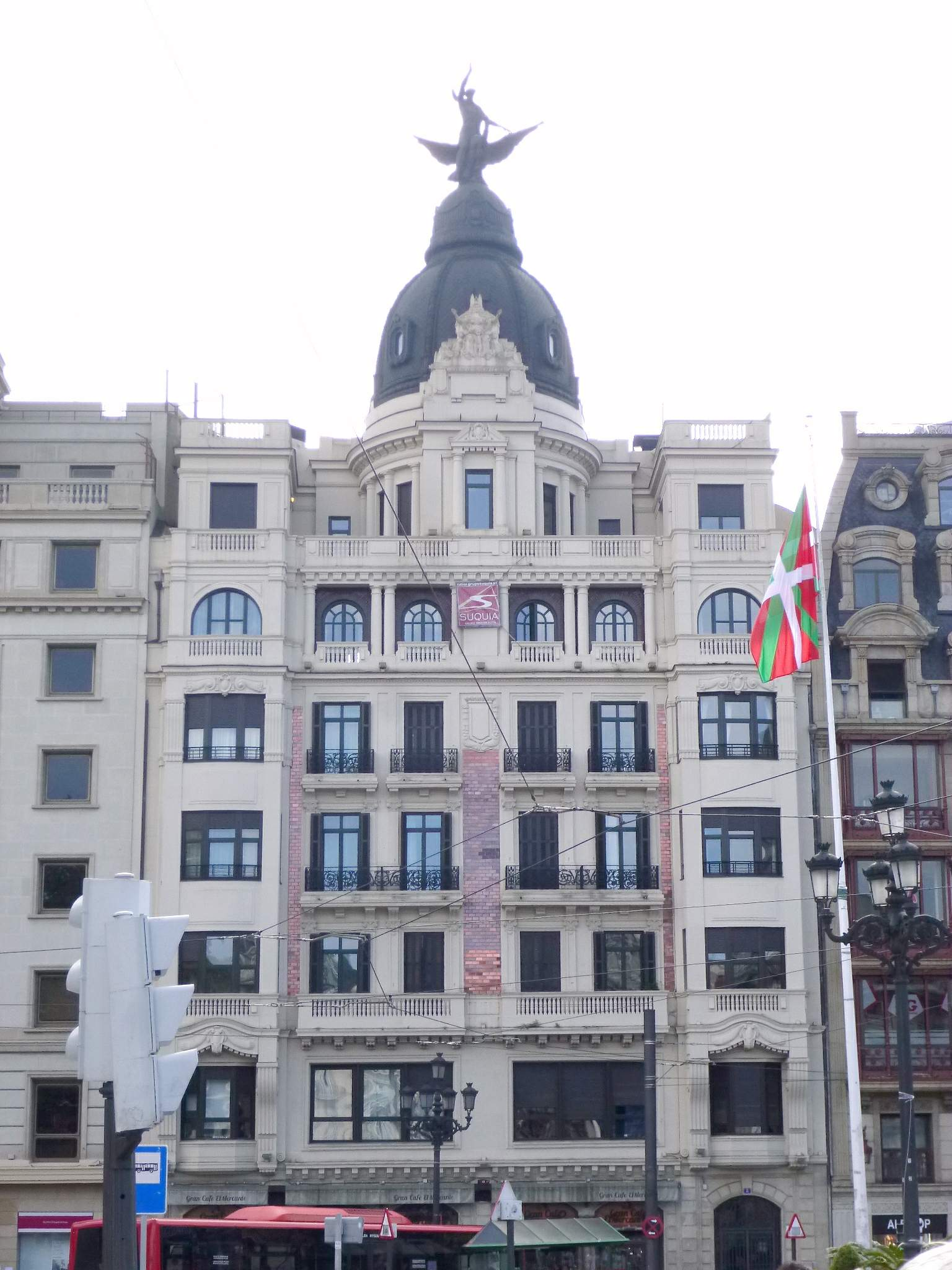 Bilbao - Edificio La Unión y el Fénix